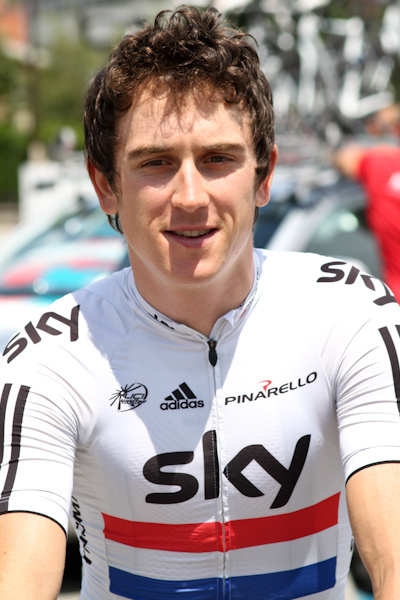 Etape 1 (Albertville) du Critérium du Dauphiné 2011